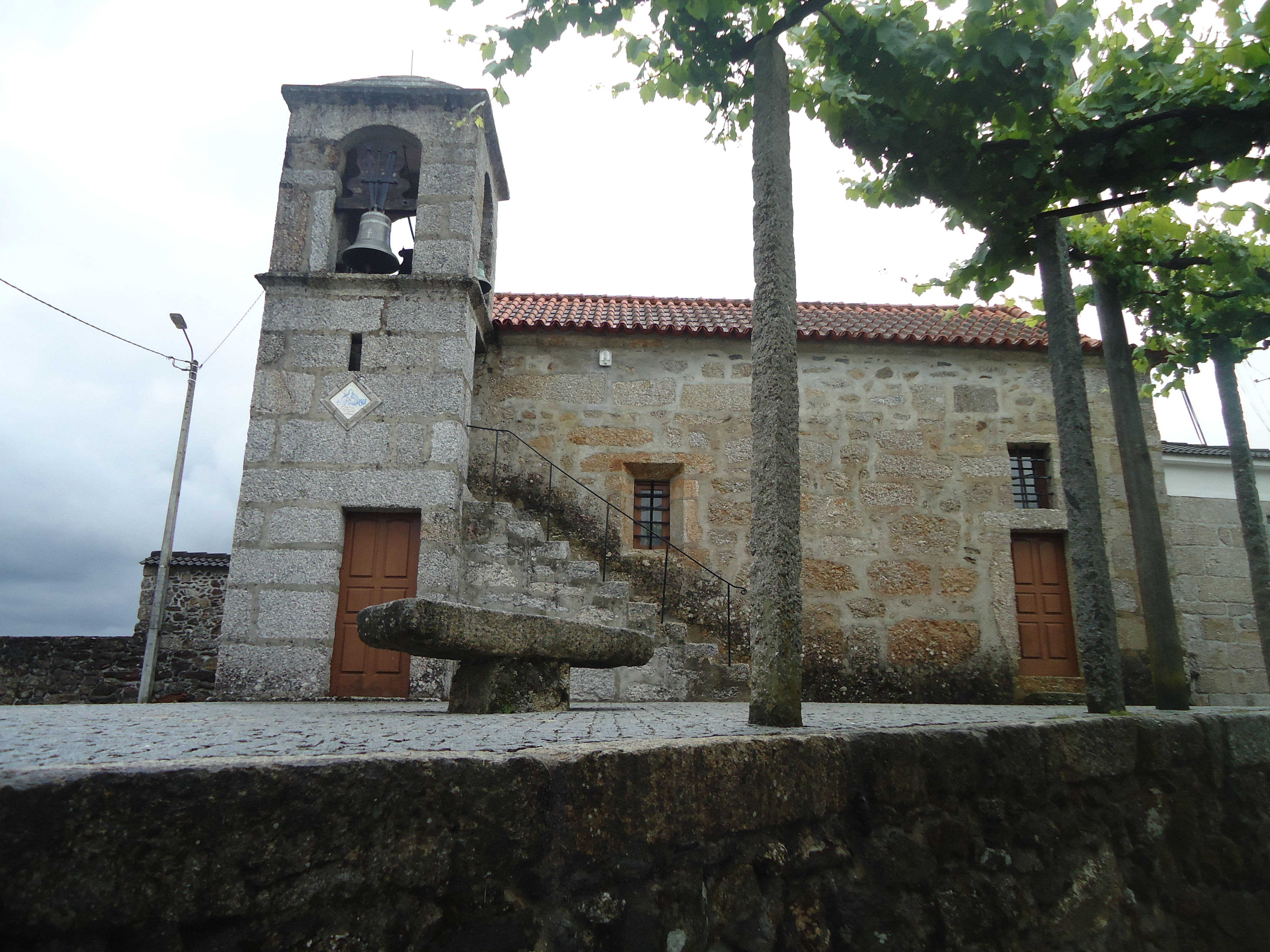 Felgueiras, Jugueiros, Capela do Assento, XI